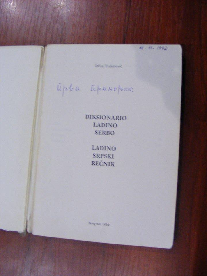 Српски (ћирилица): почетна страна речника